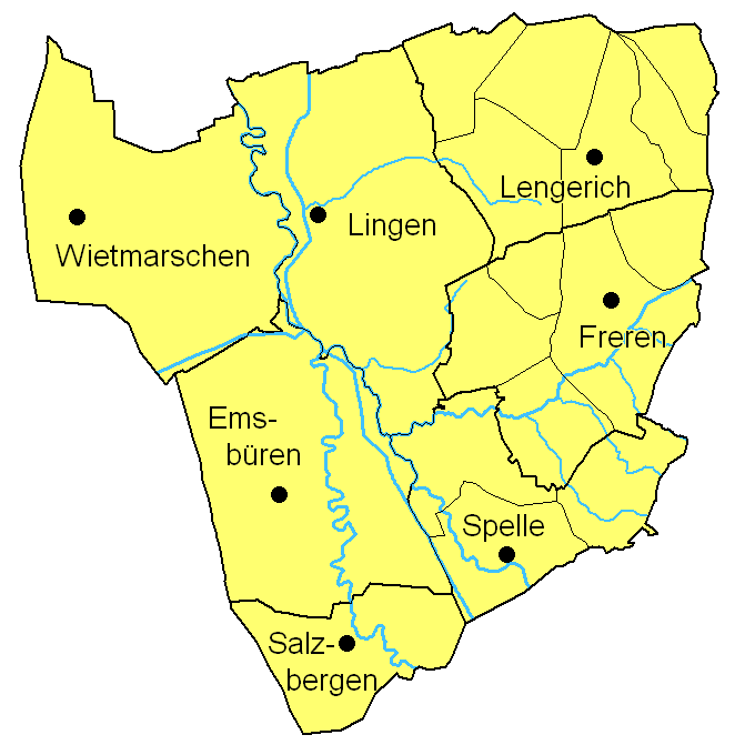 Karte des Landkreises Lingen nach der Gemeindereform 1974